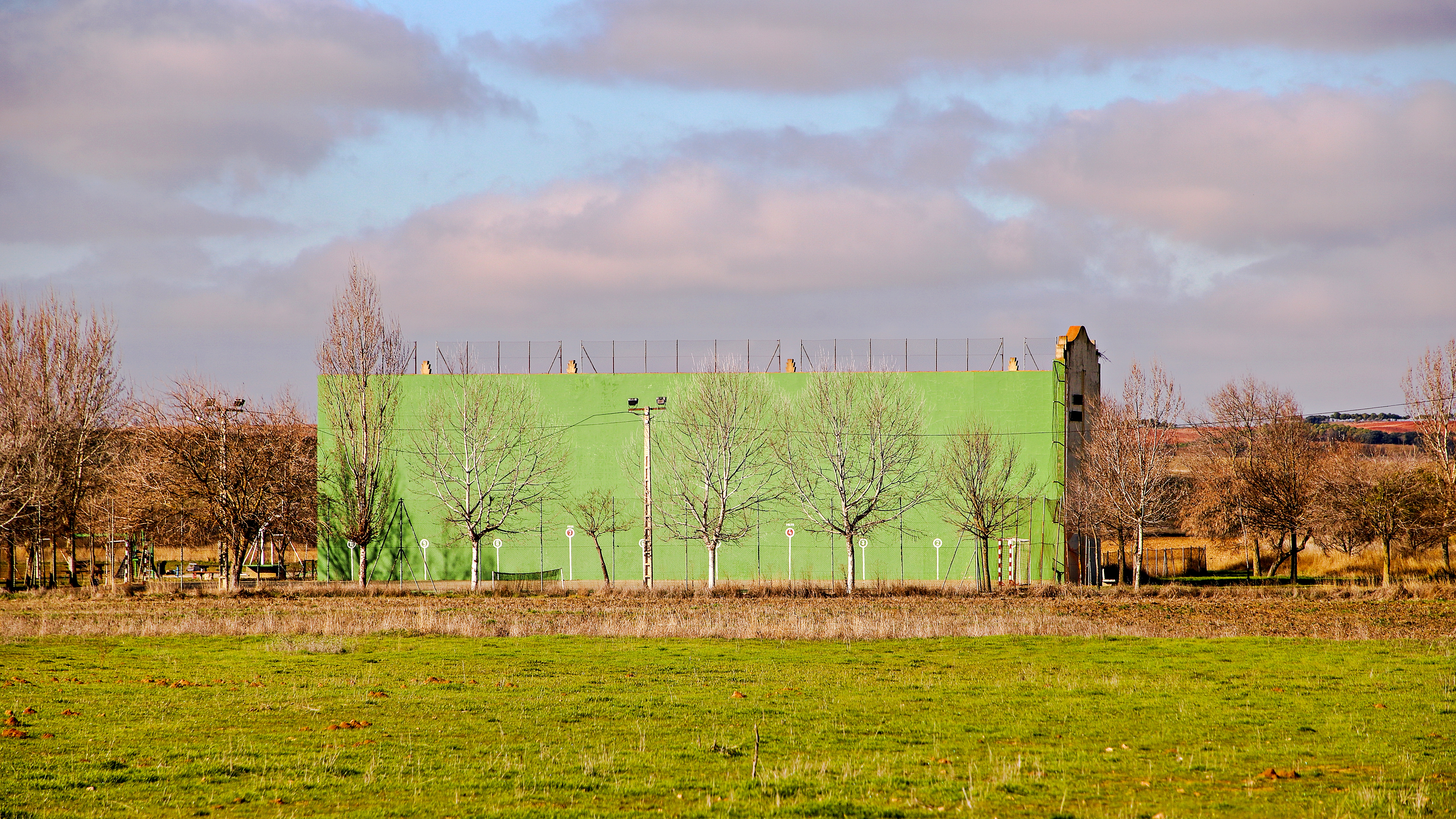 Fuentes de Ropel es un municipio de la comarca Benavente y Los Valles, provincia de Zamora.